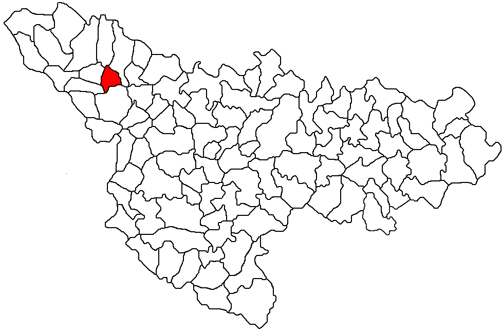 Lovrin, judetul Timis Licensing Categorie:Hărţi ale judeţului Timiş